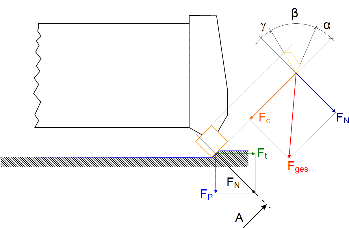 Kräfte beim Stirnfräsen